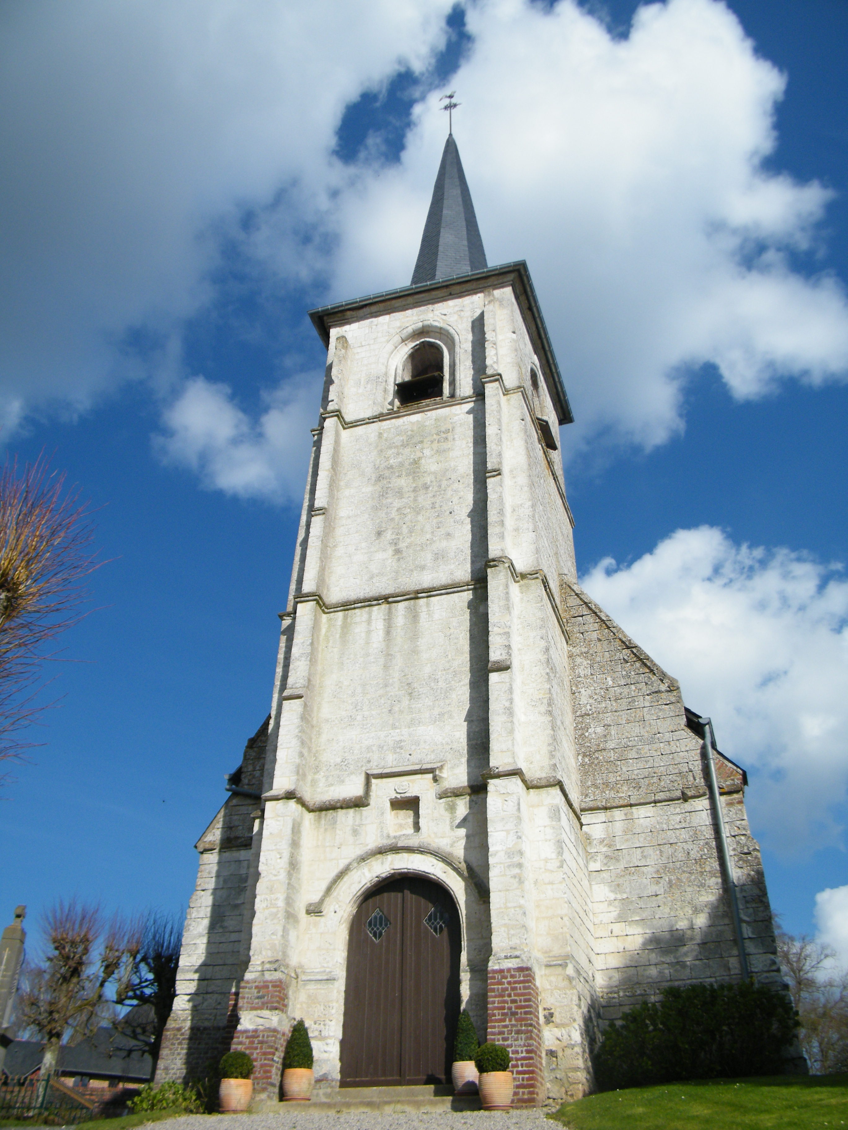 Le clocher de l'église Saint-Martin de Frucourt, Somme, France.